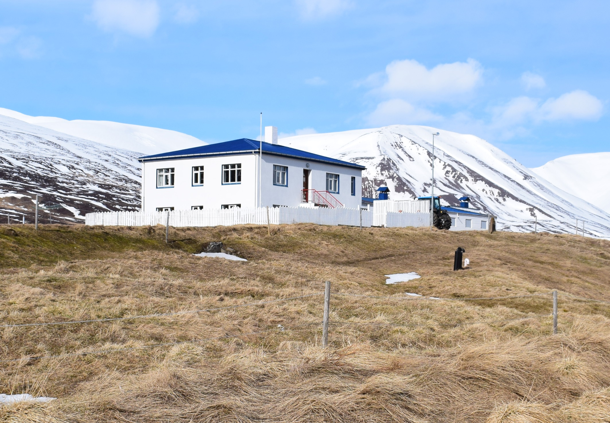 Syðraholt í Svarfaðardal